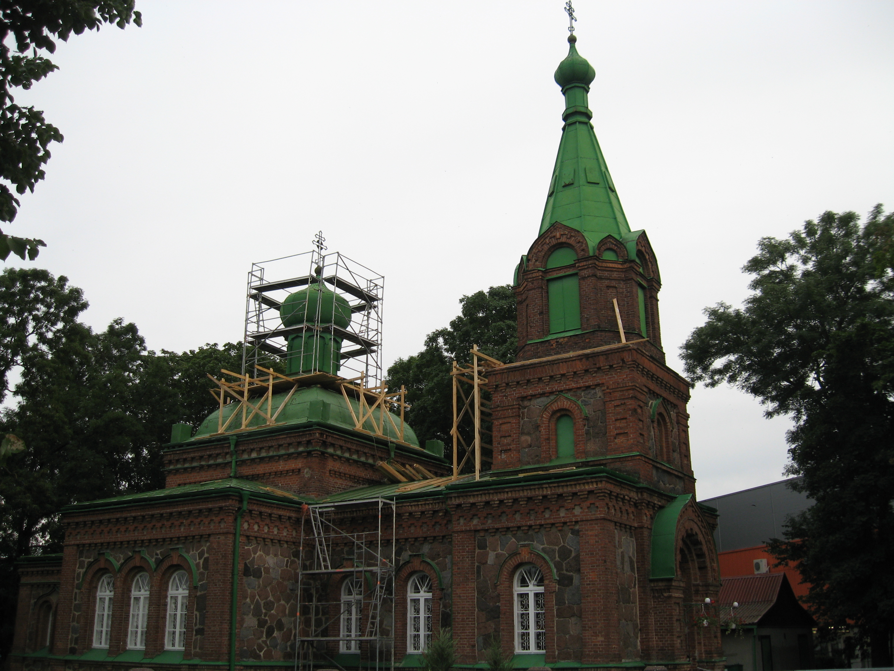 Православная церковь в городе Йыхви